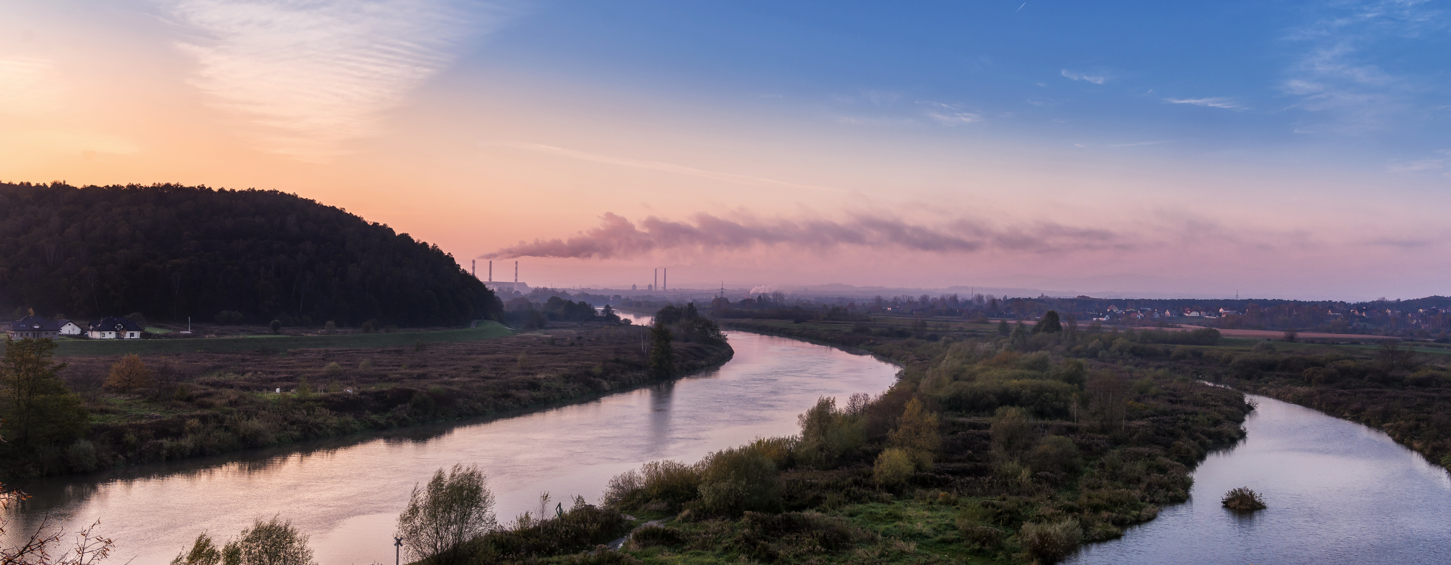 Park krajobrazowy Bielańsko-Tyniecki Park Krajobrazowy.